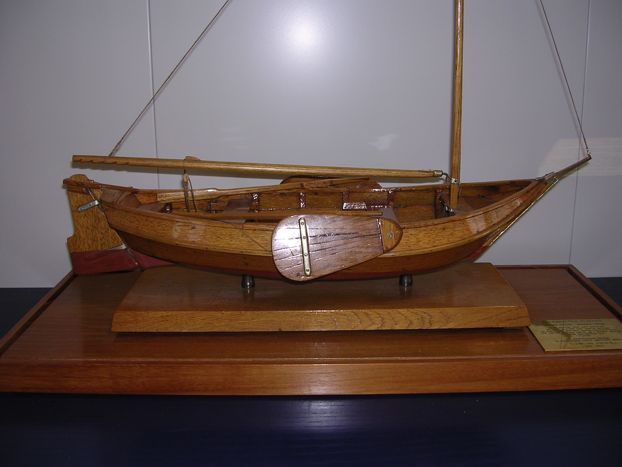 Houten grundel model van C.J.W. de Vries Bron: eigen foto 2006 H.J. de Vries eigen foto